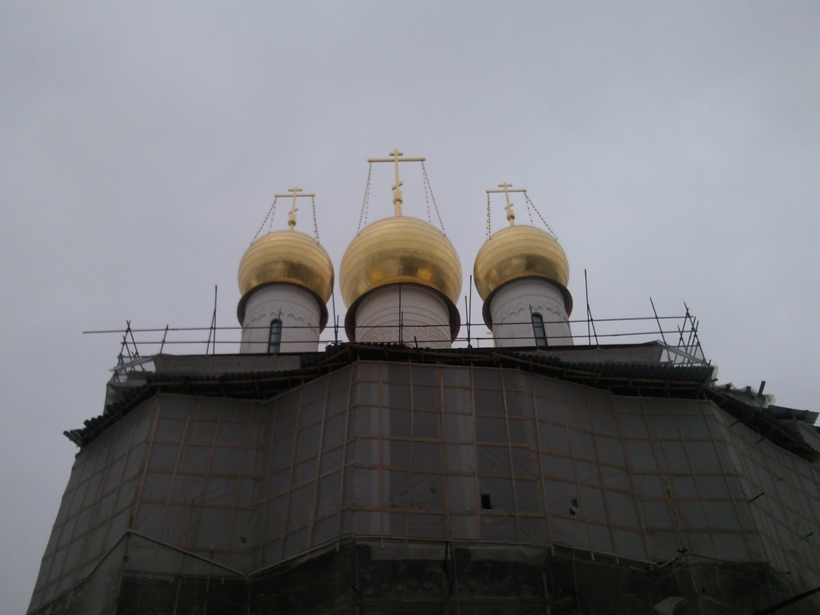 Феодоровский собор, Санкт-Петербург, реставрация.